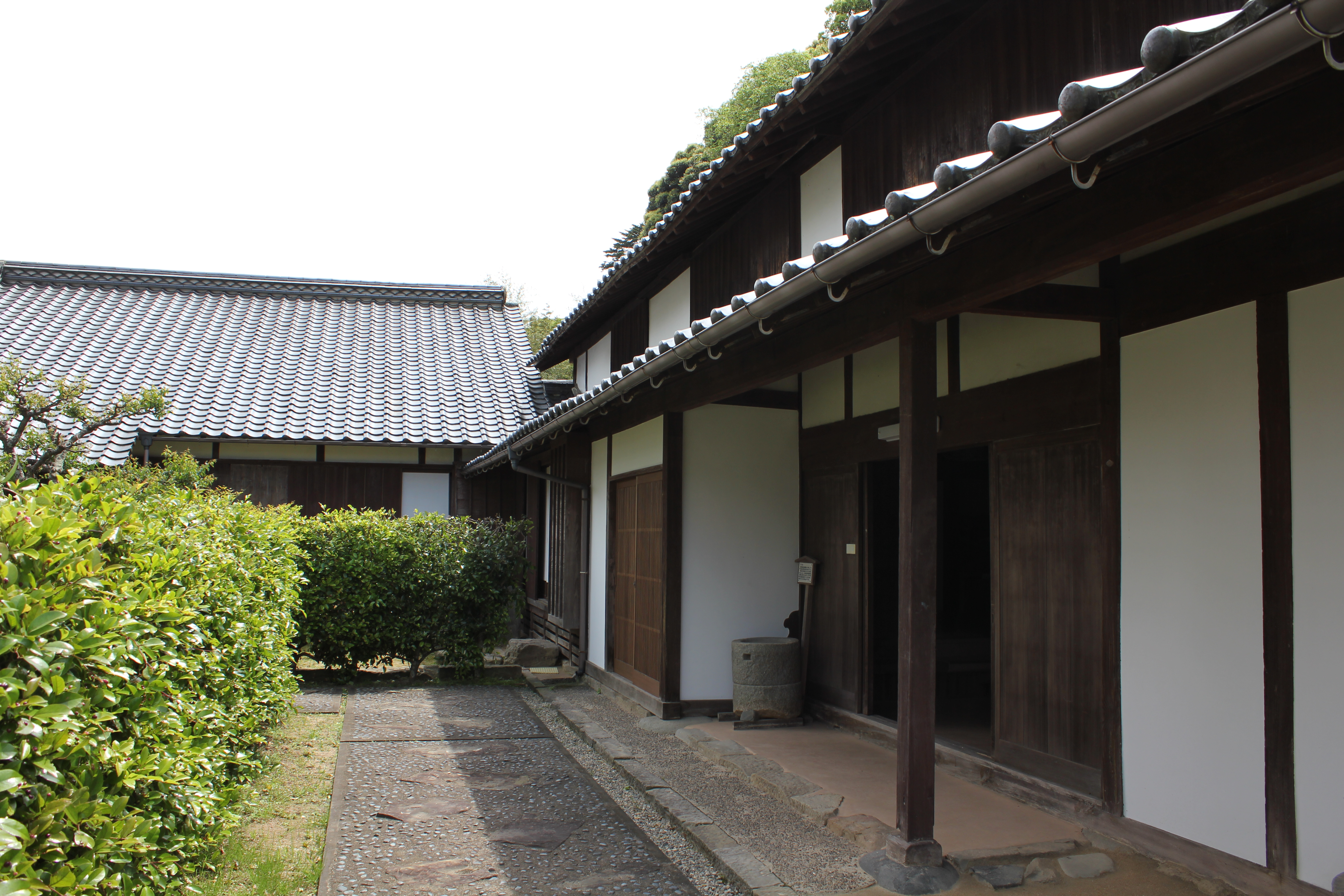 山口県萩市須佐の旧益田家